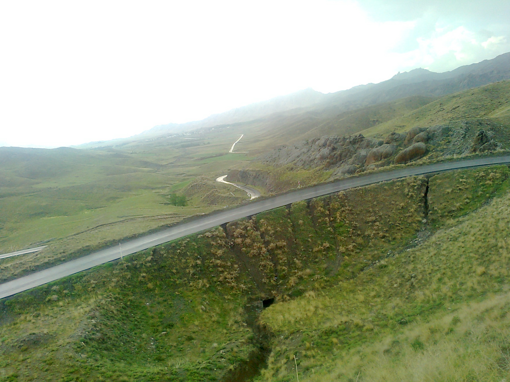 گردنه یکان در جاده یامچی-یکانات